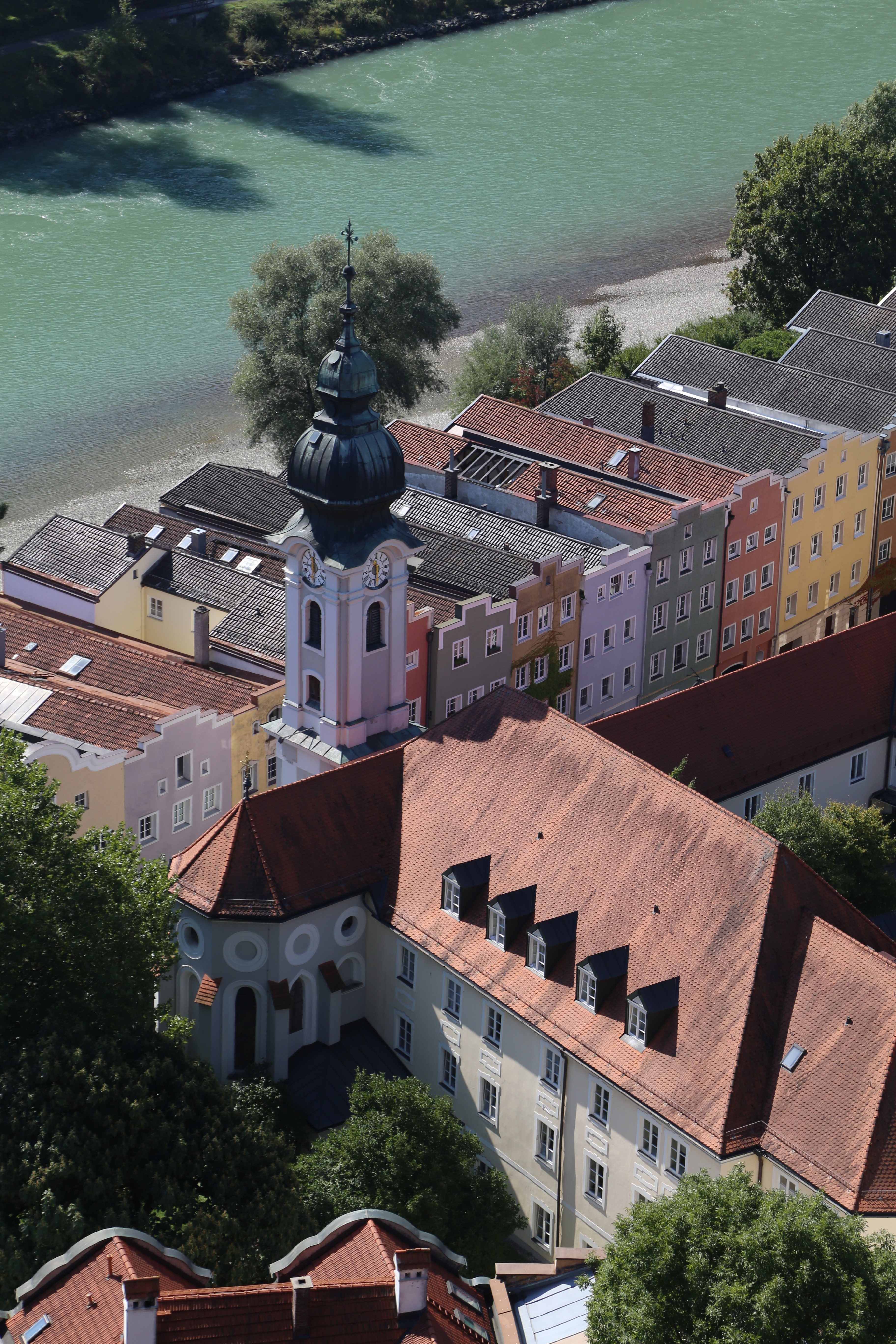 Spitalgasse 206, Heilig-Geist-Kirche, Burghausen; Spitalkirche, einschiffiger Bau mit eingezogenem Chor im 5/8-Schluss, um 1325/30, Langhaus von 1512/13, Turm mit Kuppel von Joseph Lindtmayr 1773; mit Ausstattung